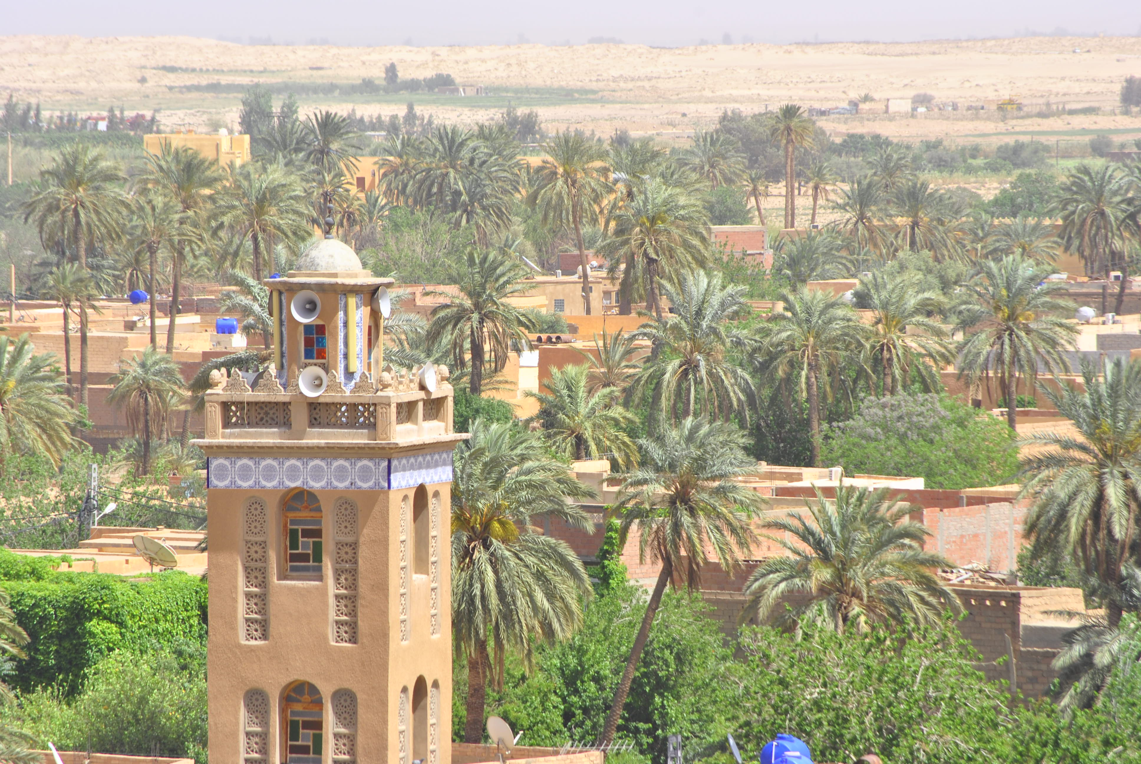 photo prise dans la ville de laghouat